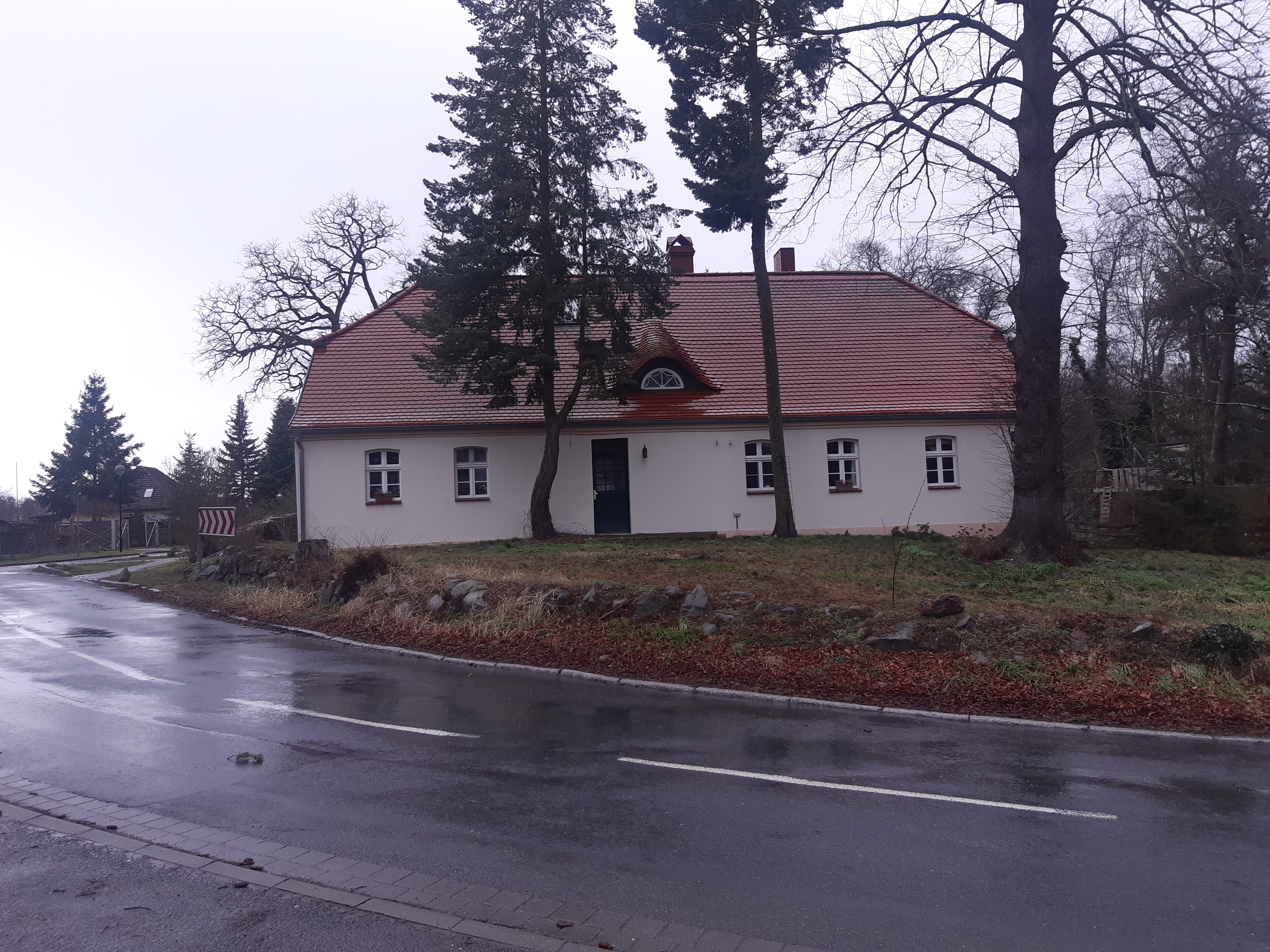 Haus